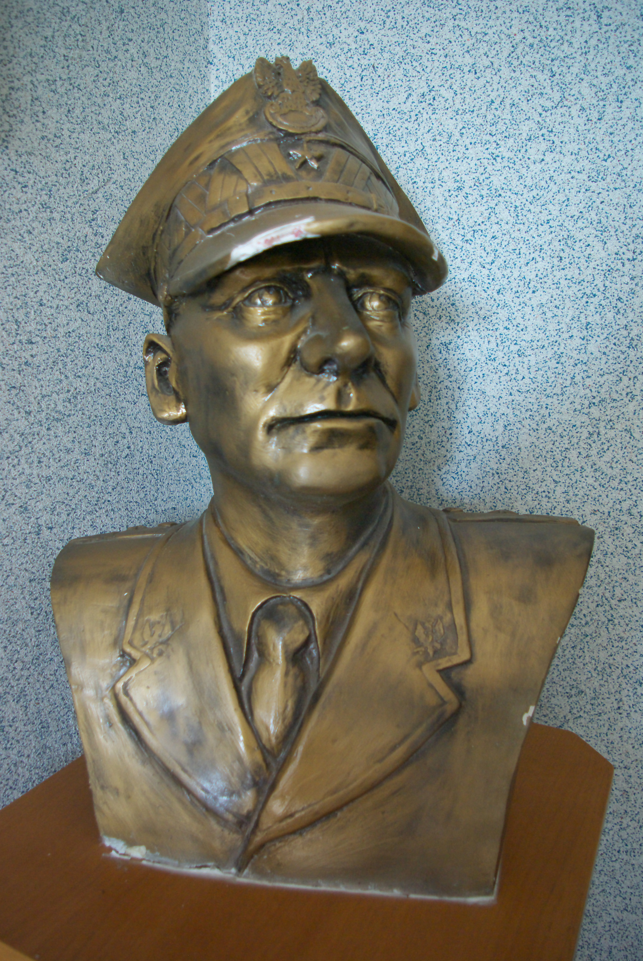 Popiersie Bronisława Prugara-Ketlinga w Ratuszu w Sanoku przy ulicy Rynek 1